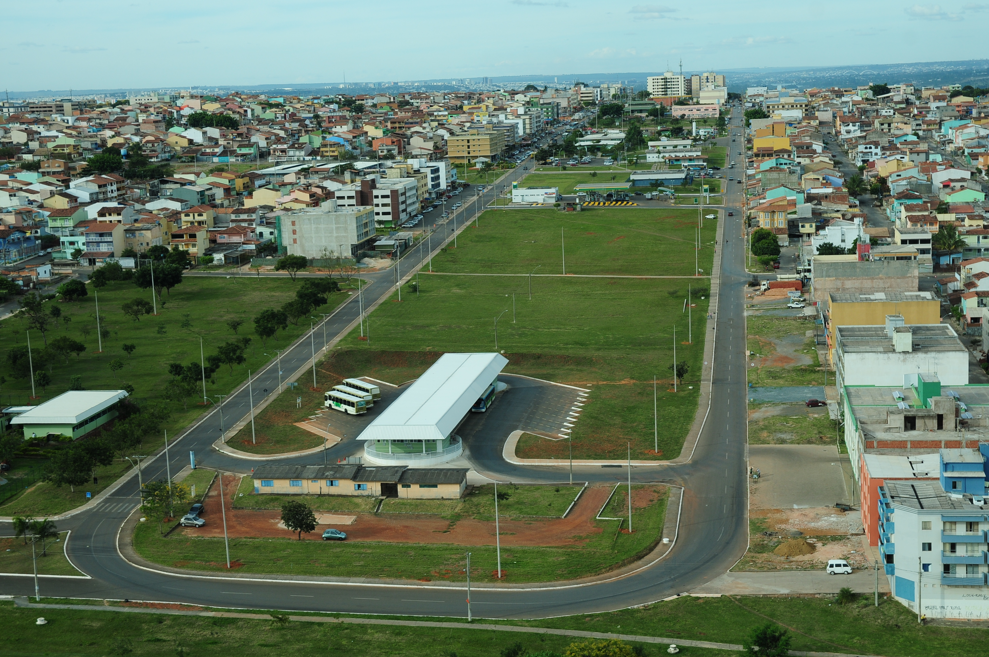 Vista aérea da área central de Riacho Fundo - DF.